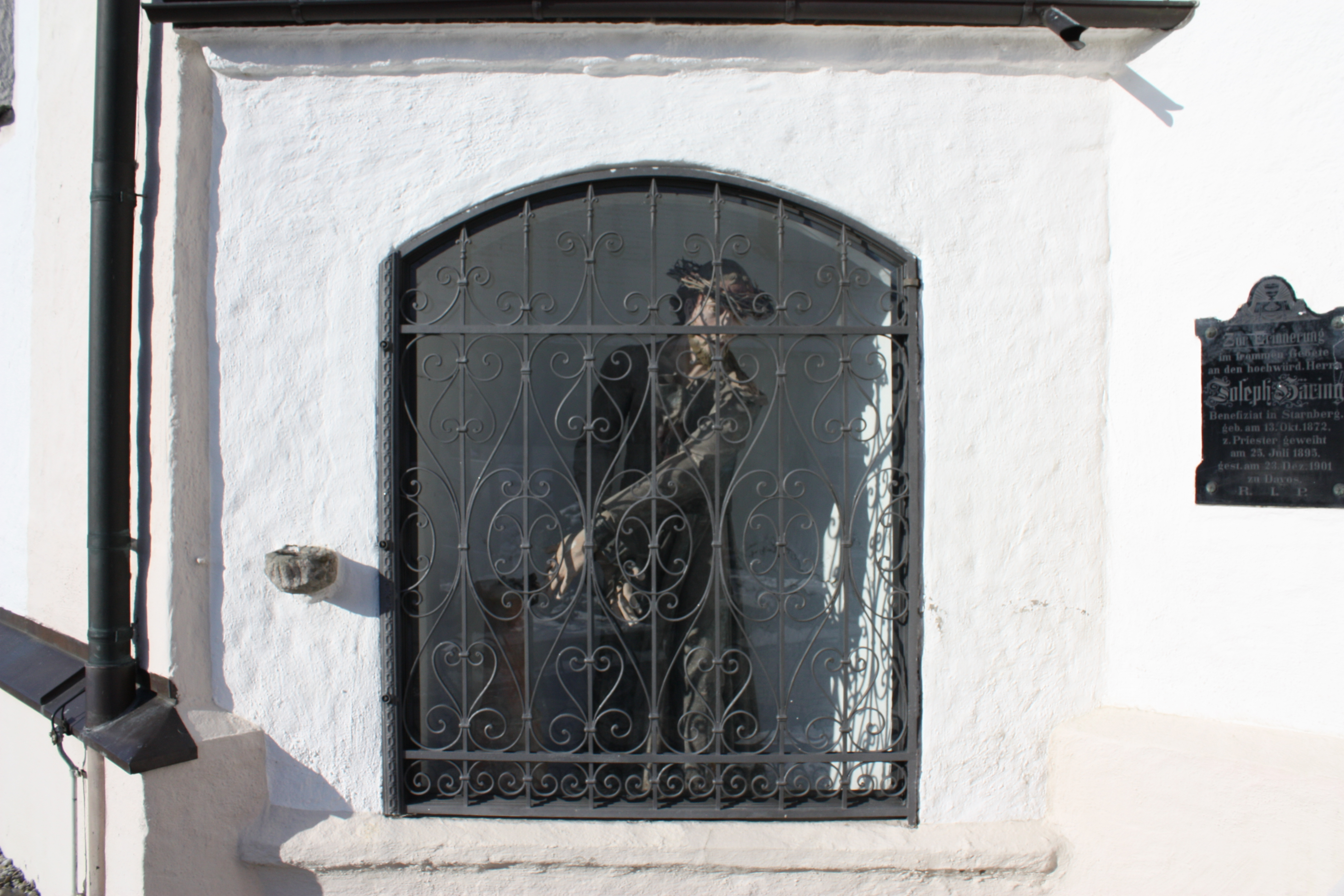 Pfarrkirche in St. Martin (Sontheim) 48°0′32.4″N 10°21′7″E / 48.009°N 10.35194°E